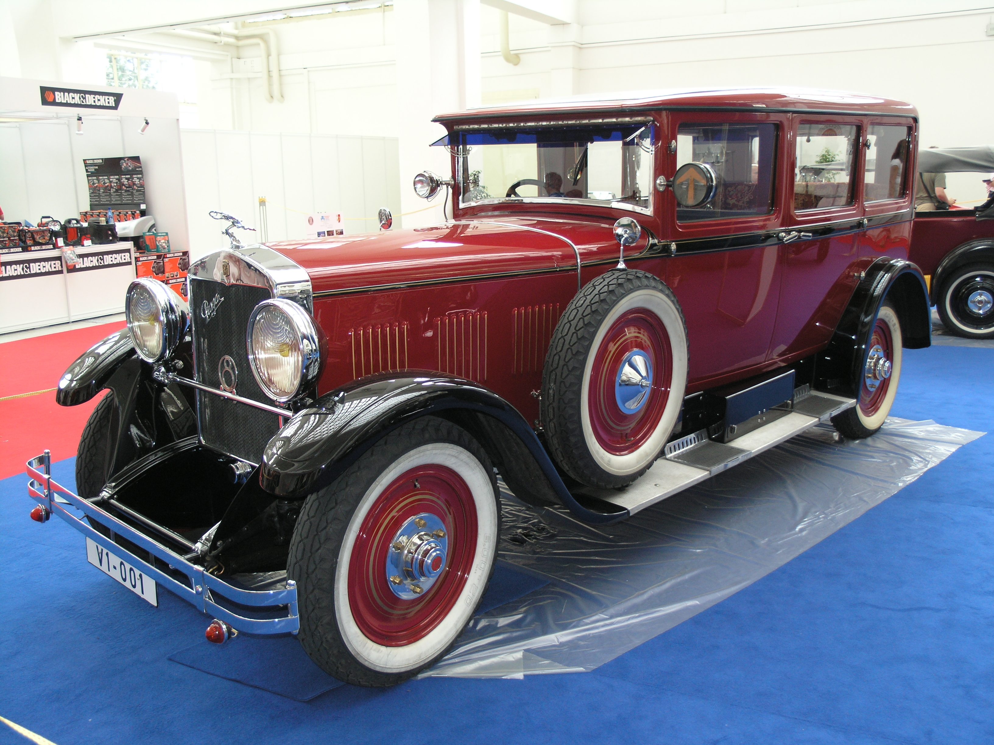 Vůz Praga Grand (1929) na výstavě Dědeček automobil v rámci Autosalónu v Brně, v roce 2007